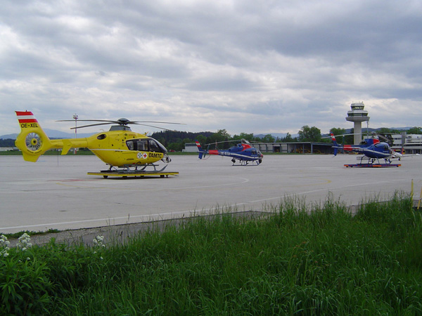 Heliport Klagenfurt mit 2 Hubschraubern des Innenministeriums und Christophorus 11